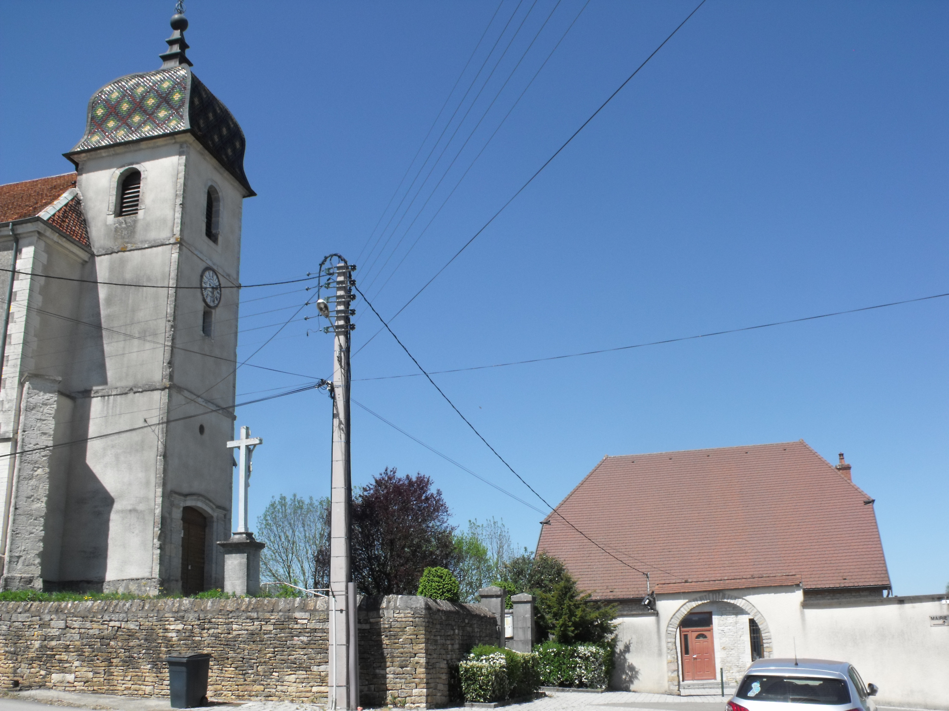 Eglise et mairie de Lavernay, Doubs, France